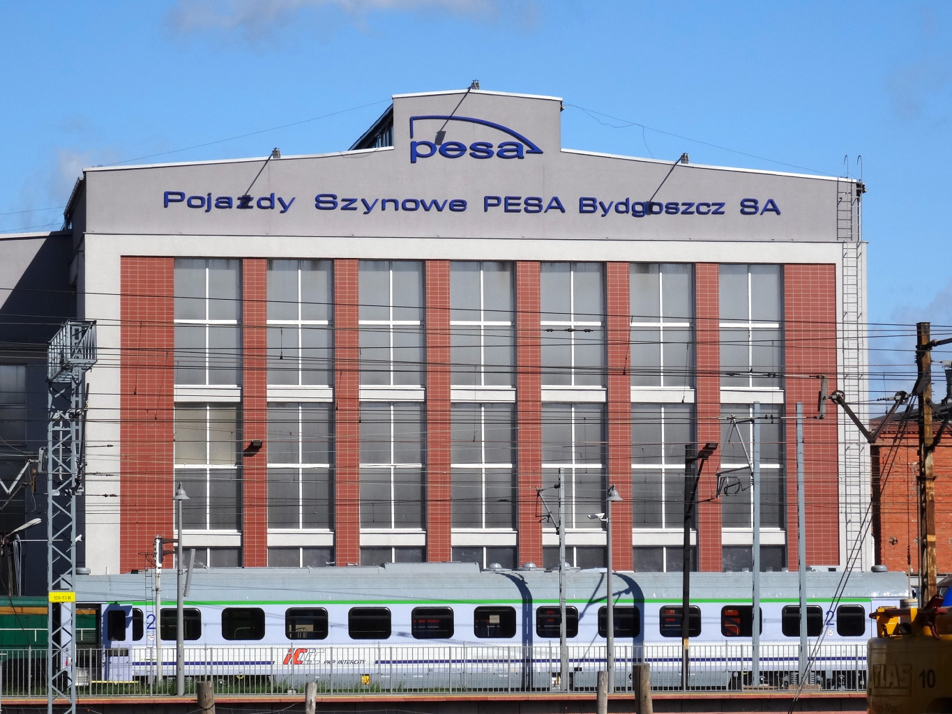 Hala montażowa Pojazdy Szynowe Pesa w Bydgoszczy. Widok od ul. Zygmunta Augusta